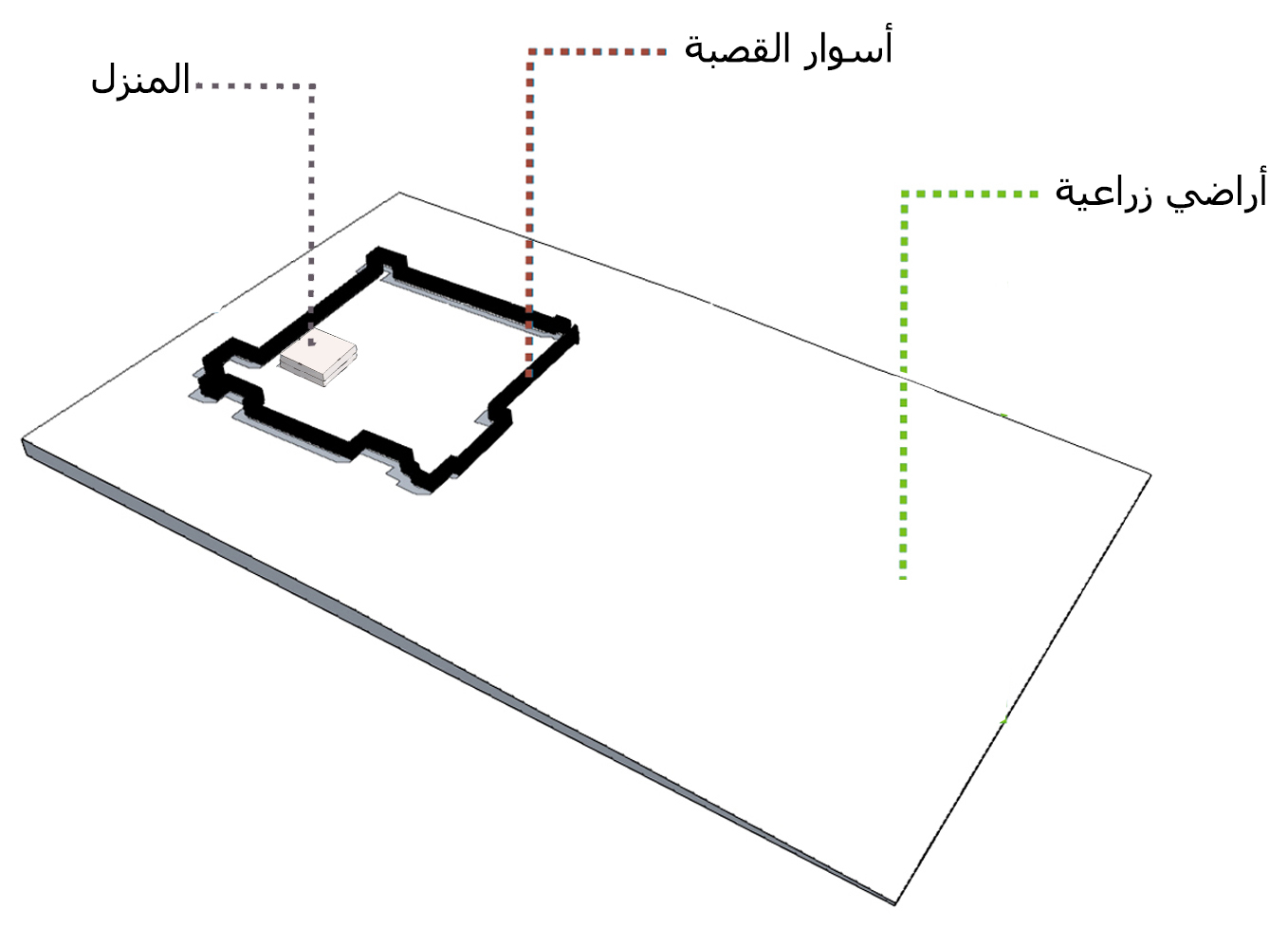 رسم توضيحي لقصبة دار بوعزة في مدينة الدار البيضاء، المغرب